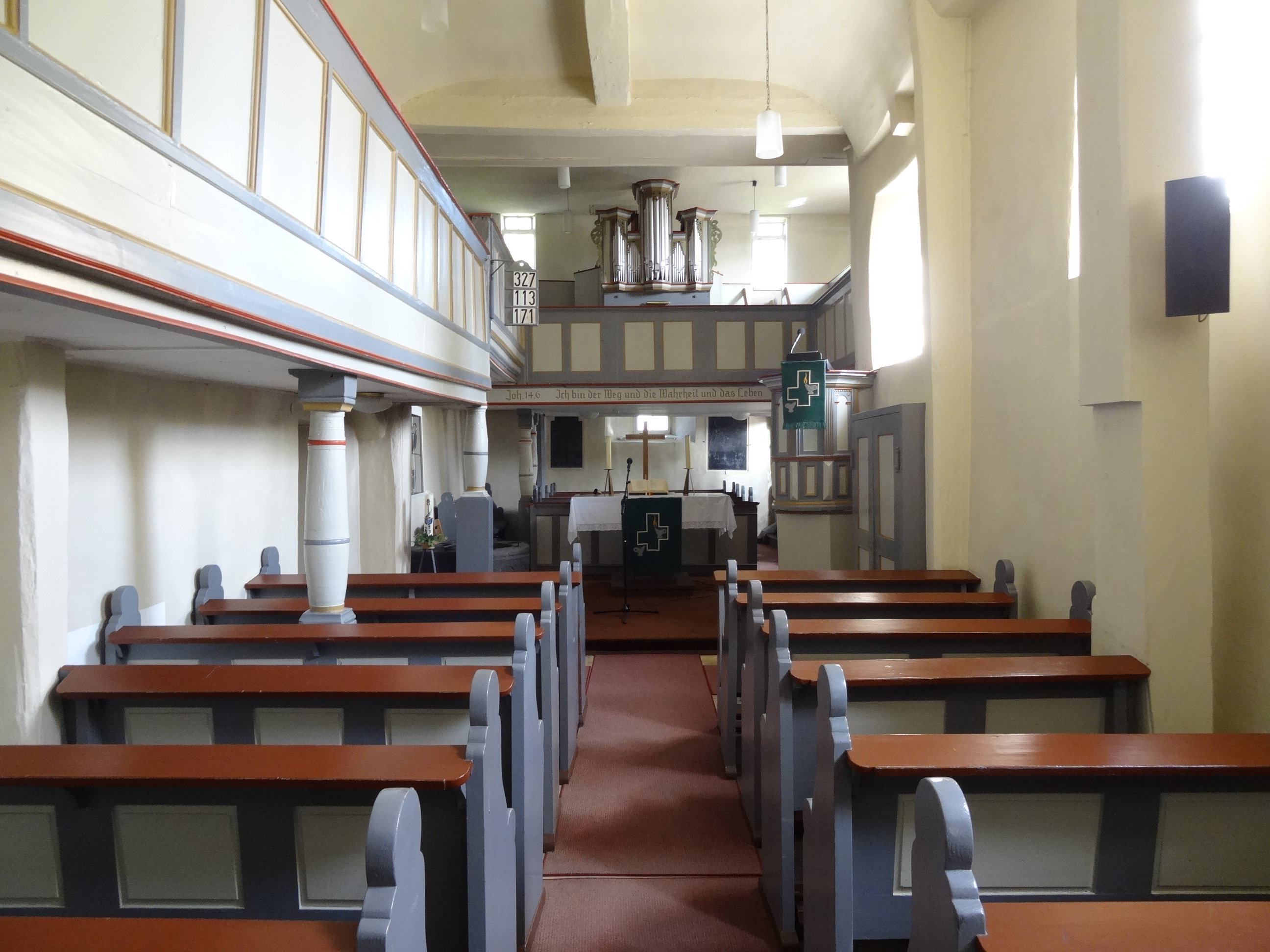 Evangelische Pfarrkirche Reiskirchen